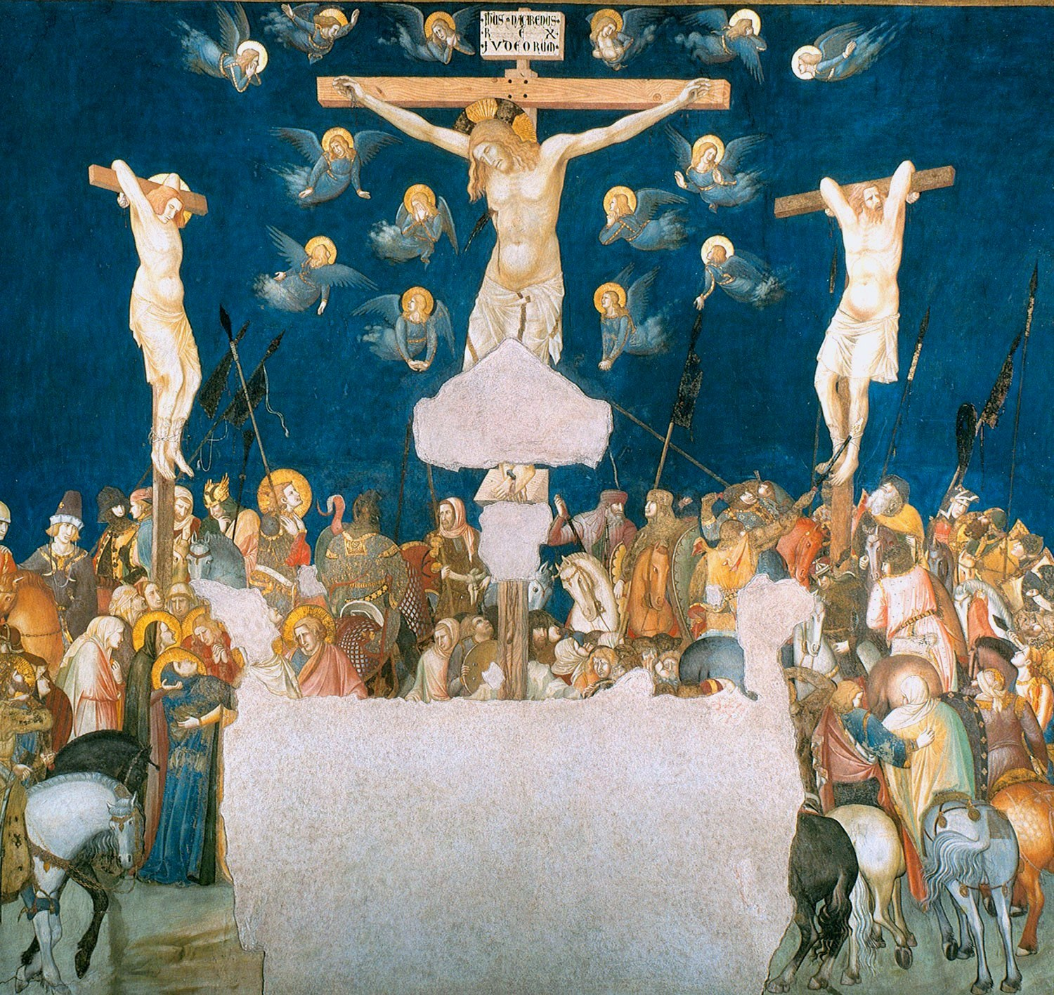 The Crucifixion - by Pietro_Lorenzetti_fresco_in_Basilica_di_San_Francesco_of_Assisi